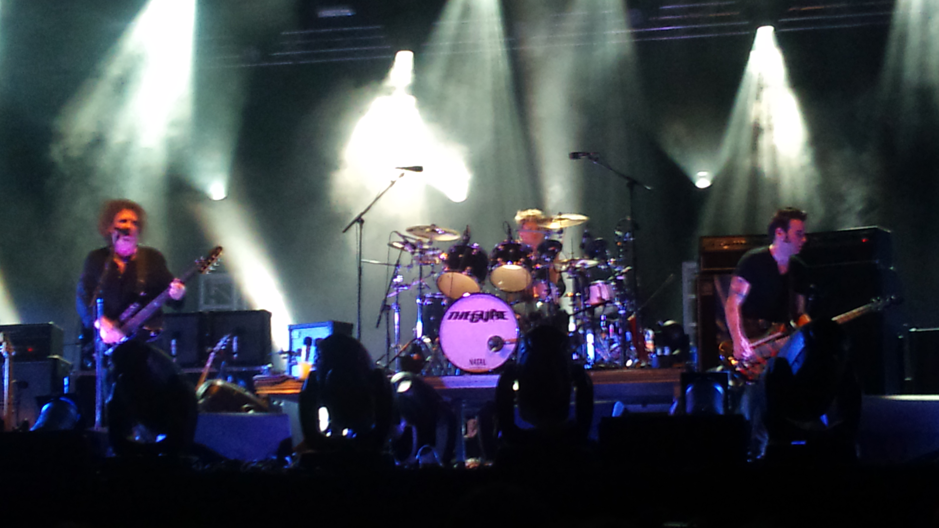 Fotografía tomada el 1/06/2012 durante el Primavera Sound (Barcelona) de la banda The Cure